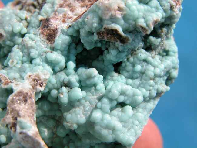 frankolit = apatyt, pochodzenie Rosja Płw. Kolski; autor zdjęcia Piotr Menducki